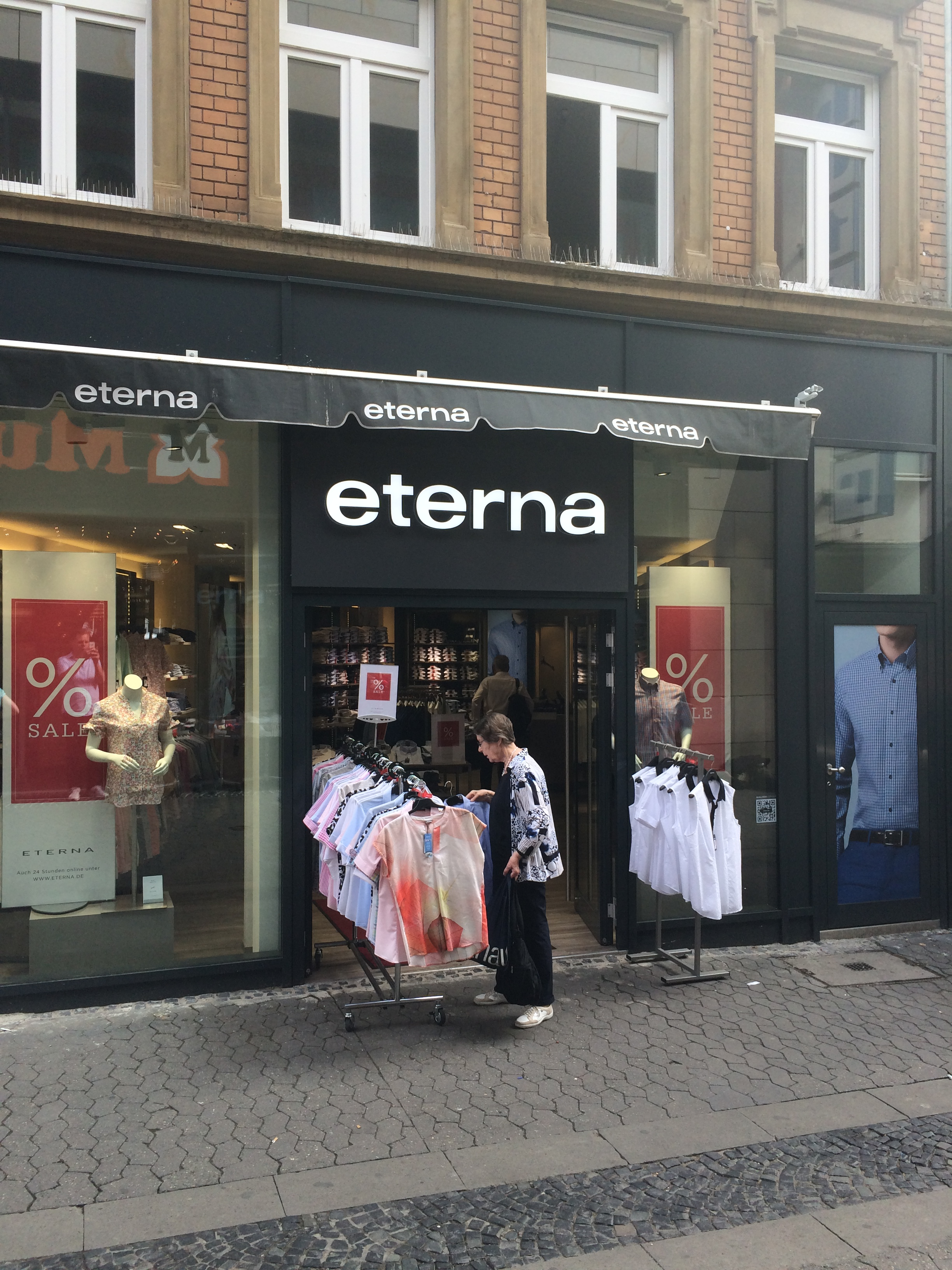 Eterna Laden Mainz